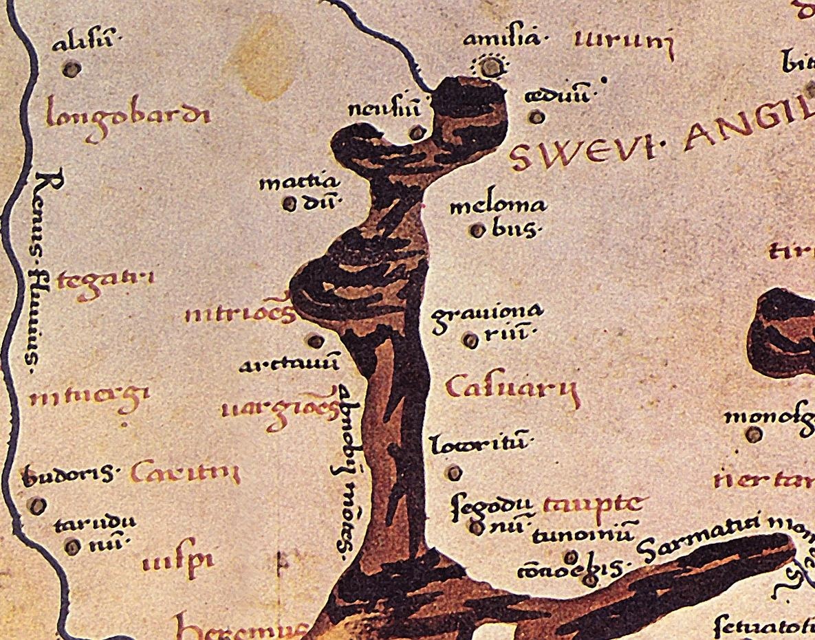 Die Gebirgsbezeichnung "ABNOBA", Detailbild von der Karte zur Germania magna.